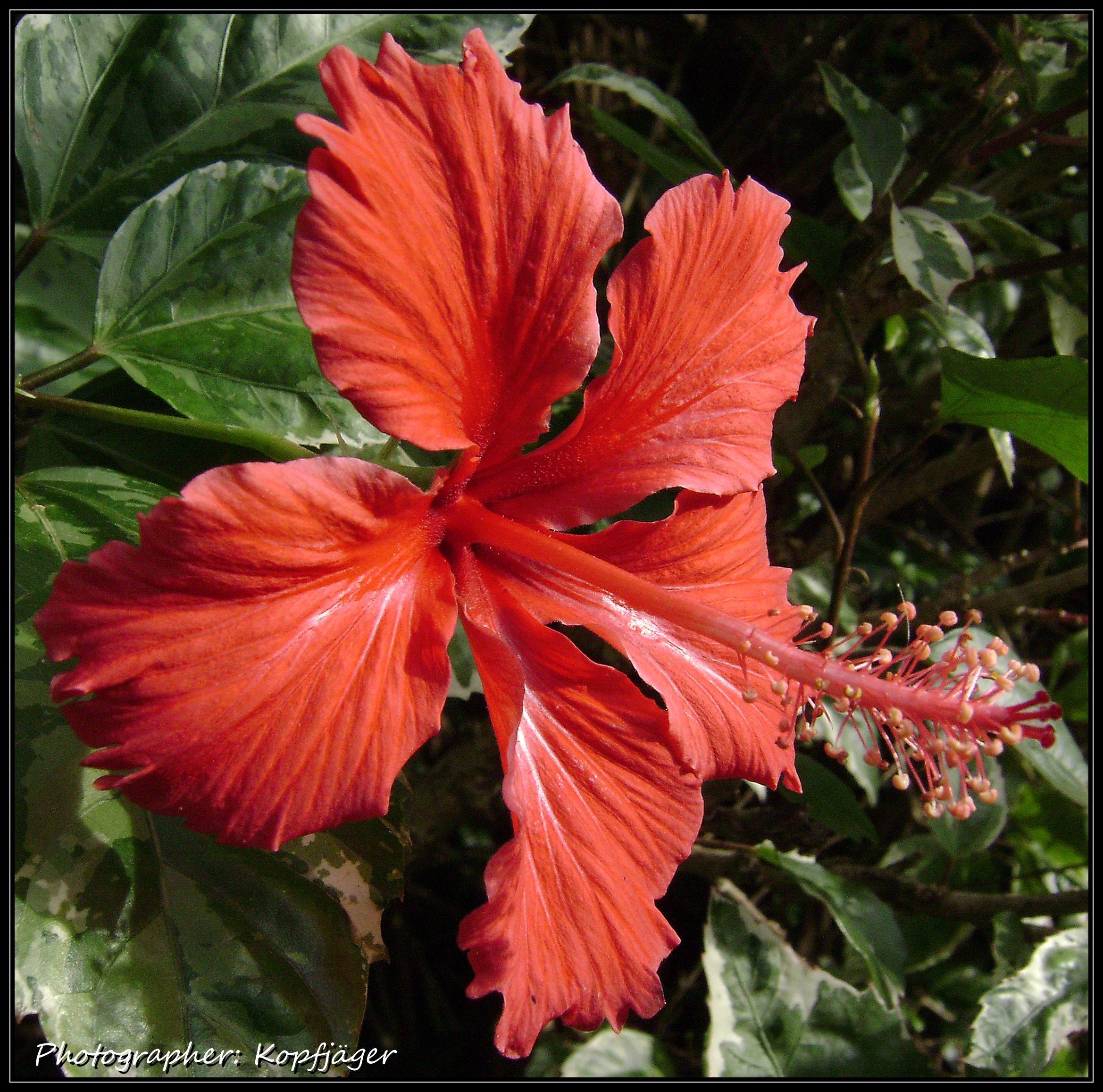 Hibiscus rosa-sinensis